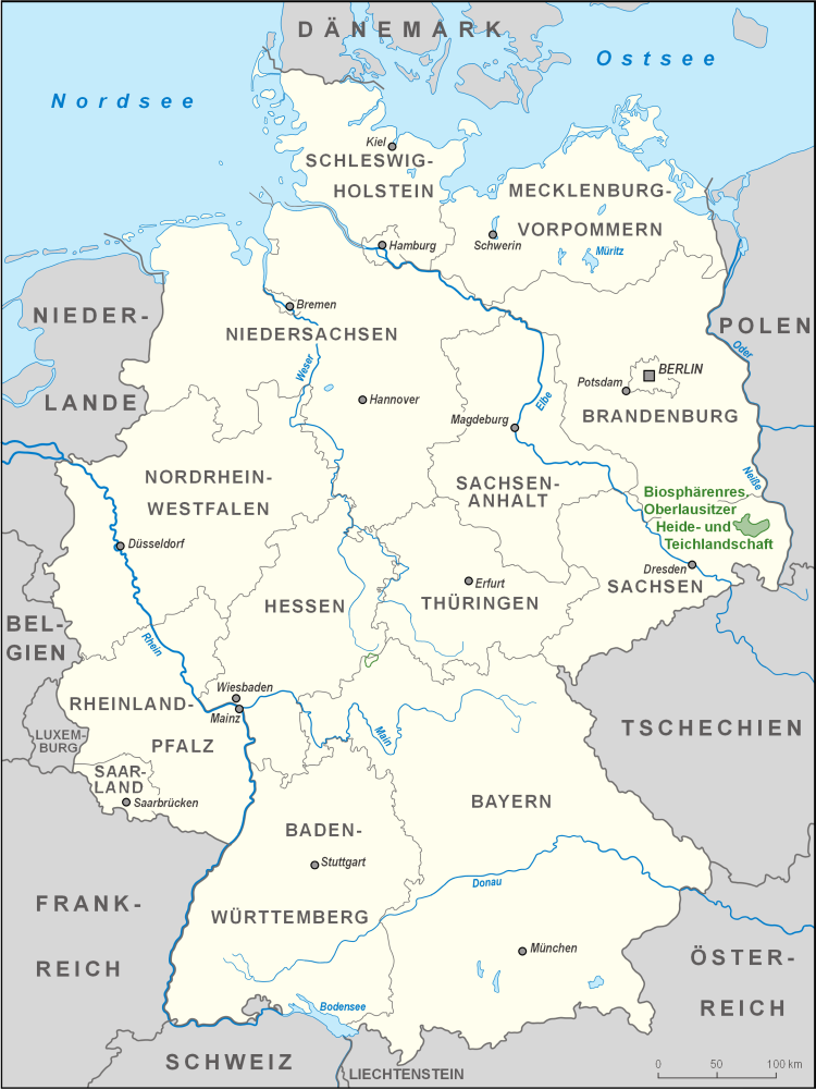 Karte des Biosphärenreservates Oberlausitzer Heide- und Teichlandschaft in Deutschland